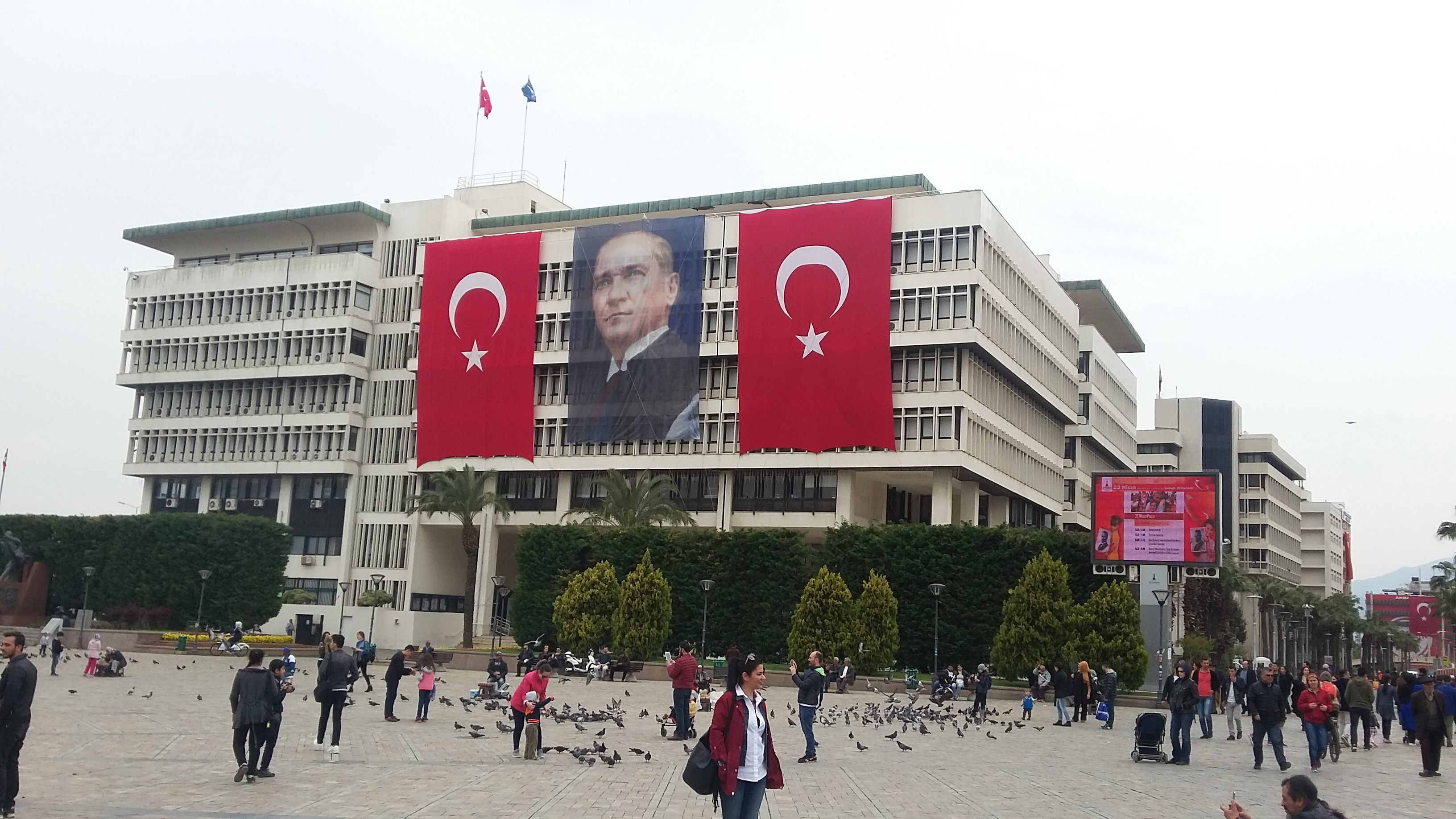 İzmir Büyükşehir Belediyesi, Konak, İzmir